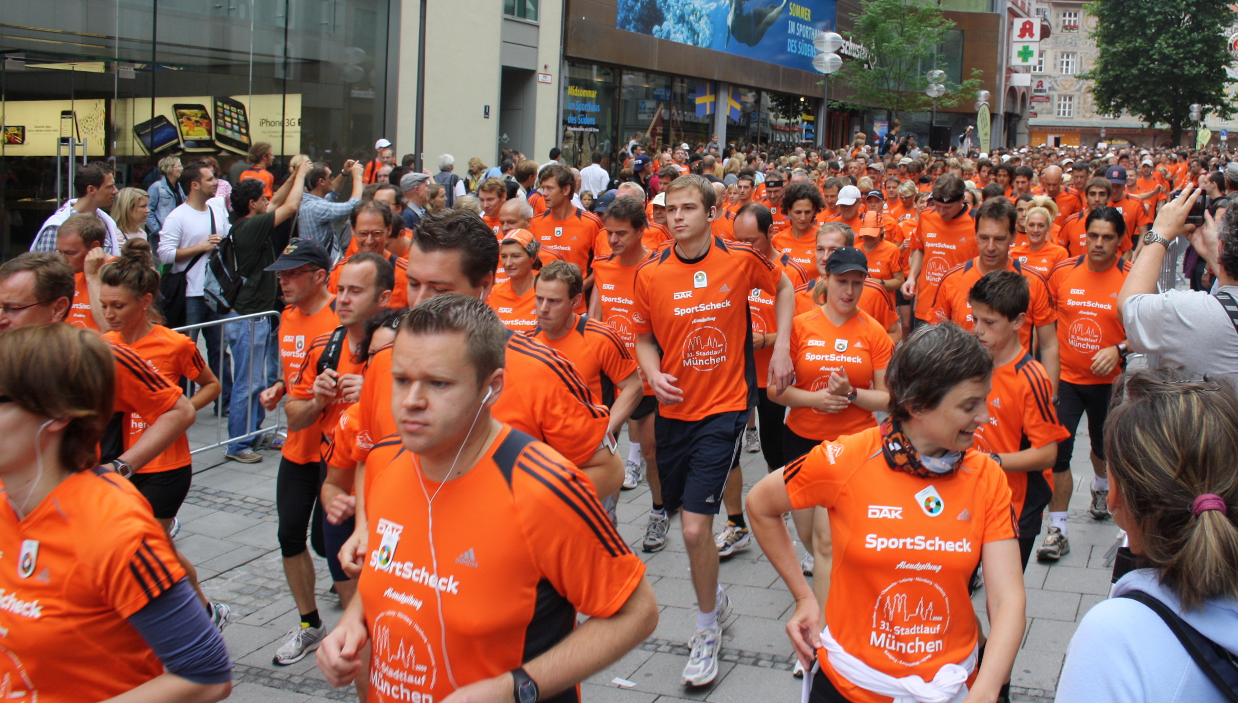 Münchner Stadtlauf 2009. Start der 10 km Strecke